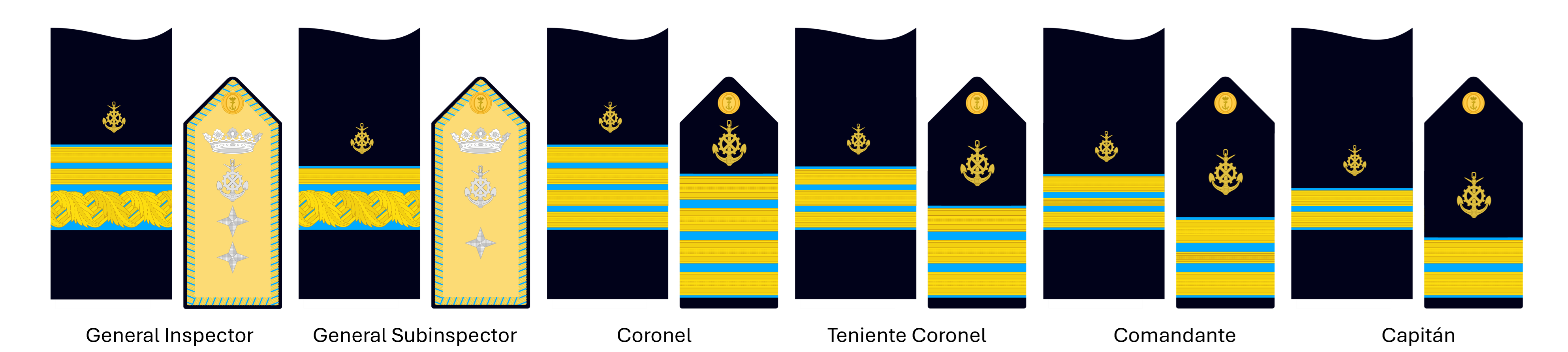 Bocamangas del cuerpo de Ingenieros Navales de la Armada, activo hasta 1967.